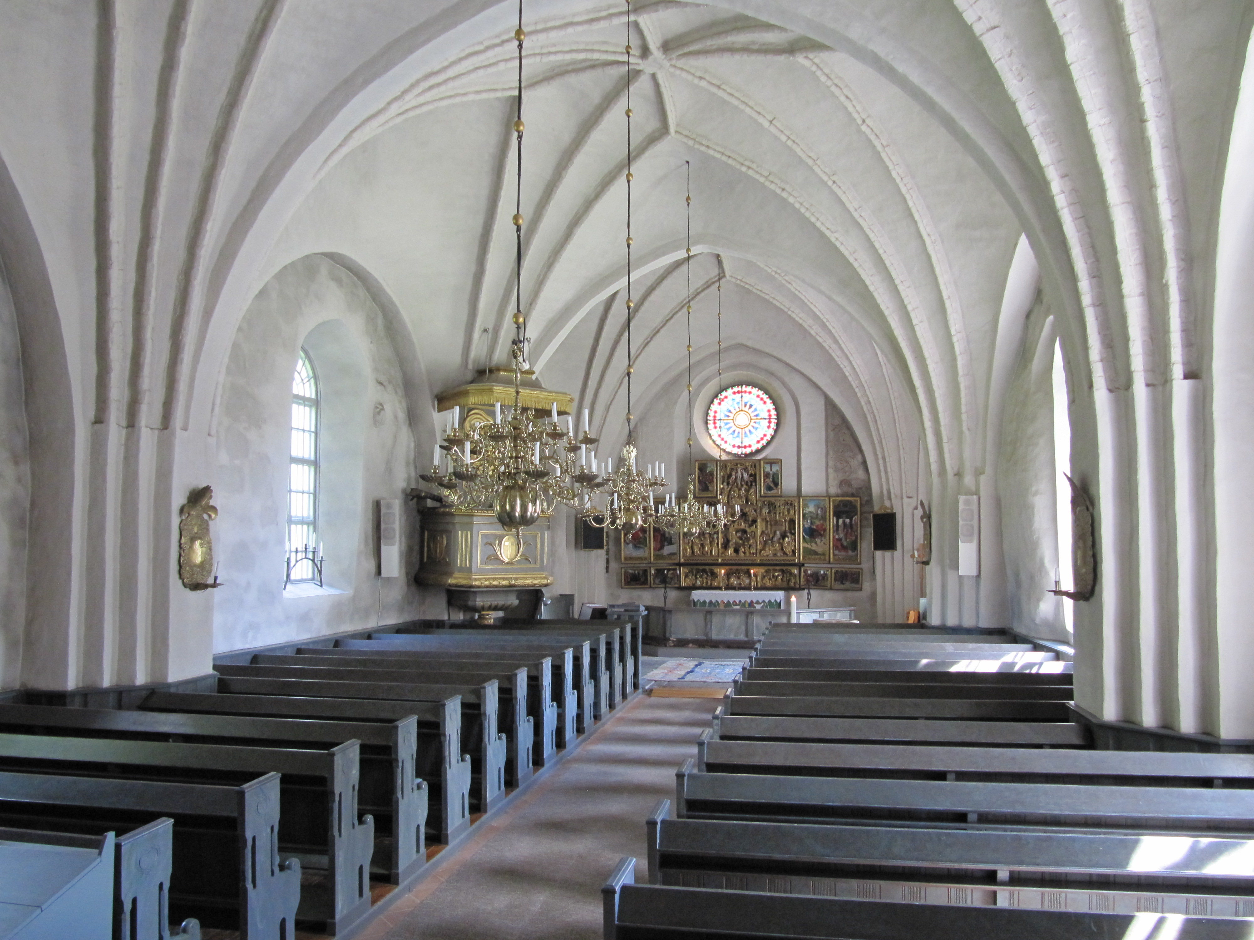 Kyrkorum i Skepptuna kyrka